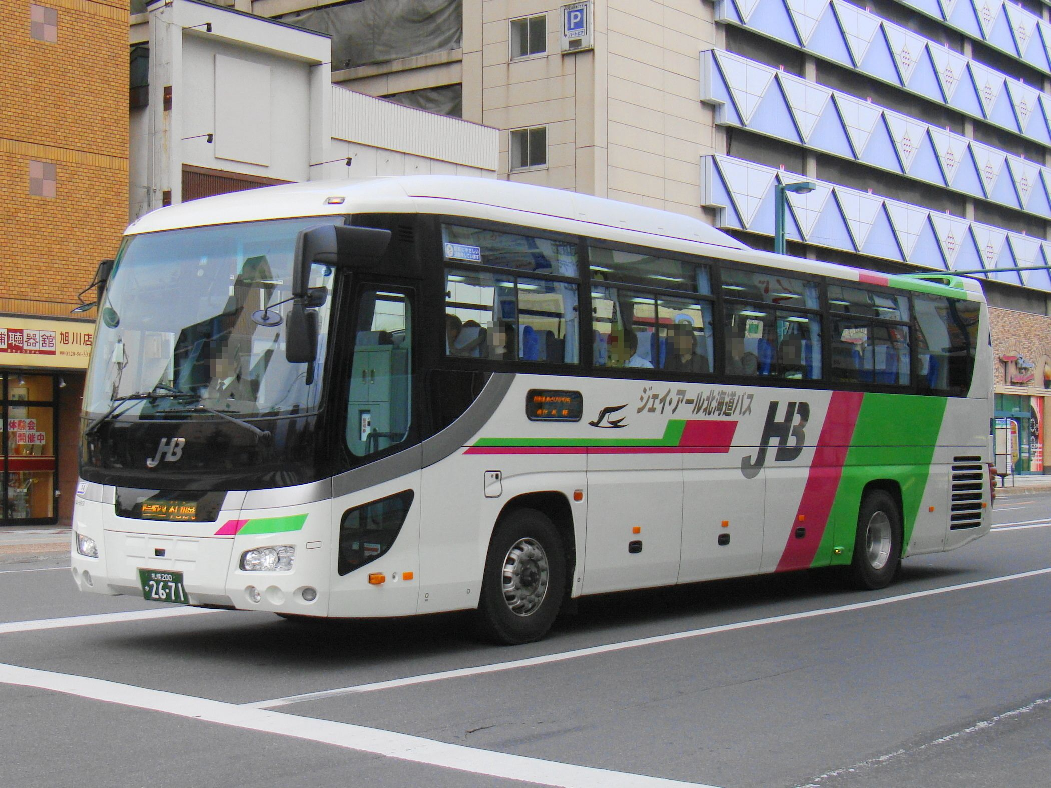 "Kōsoku Asahikawa gō" Asahikawa to Sapporo